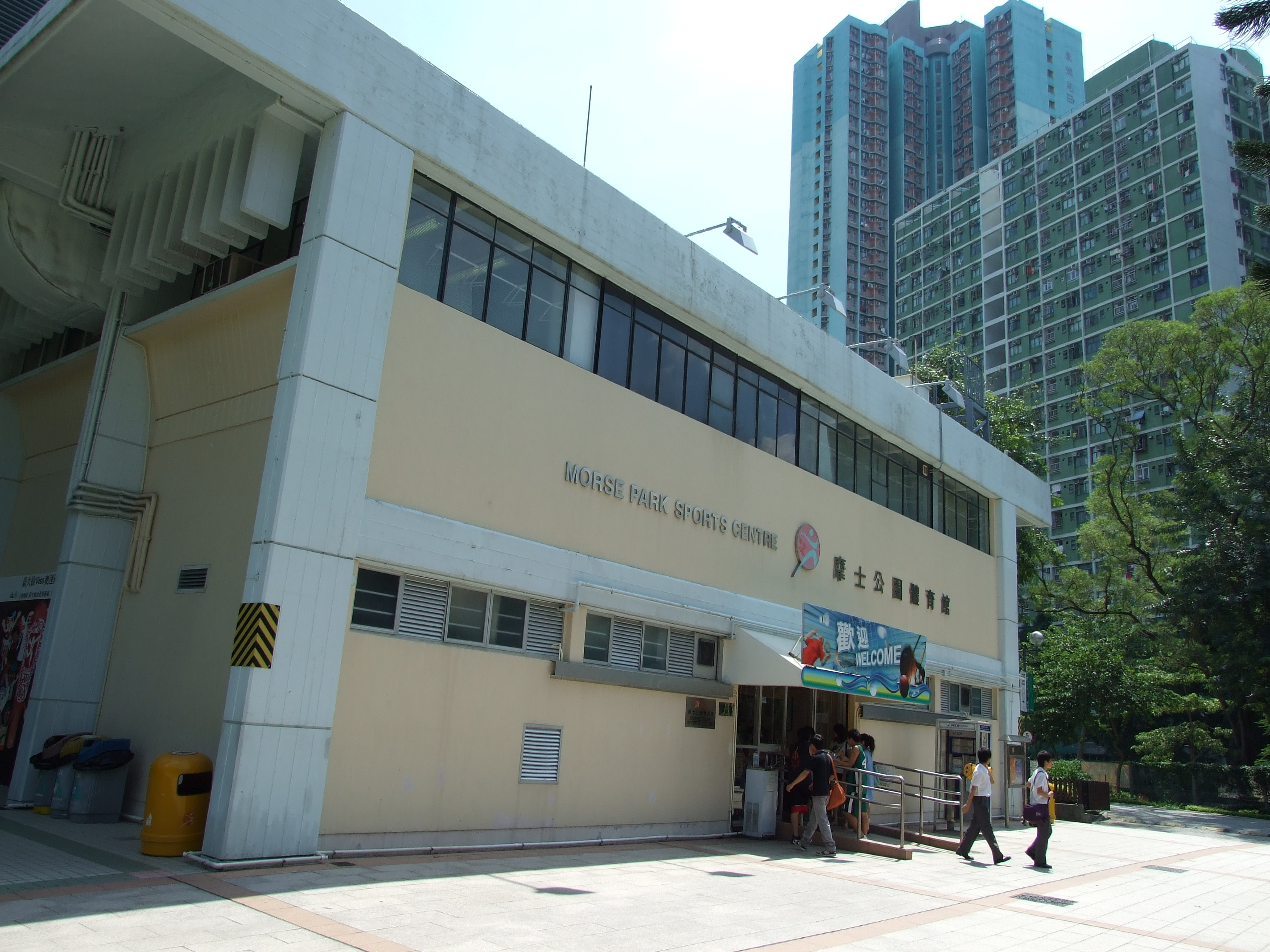 中文（香港）: 摩士公園體育館